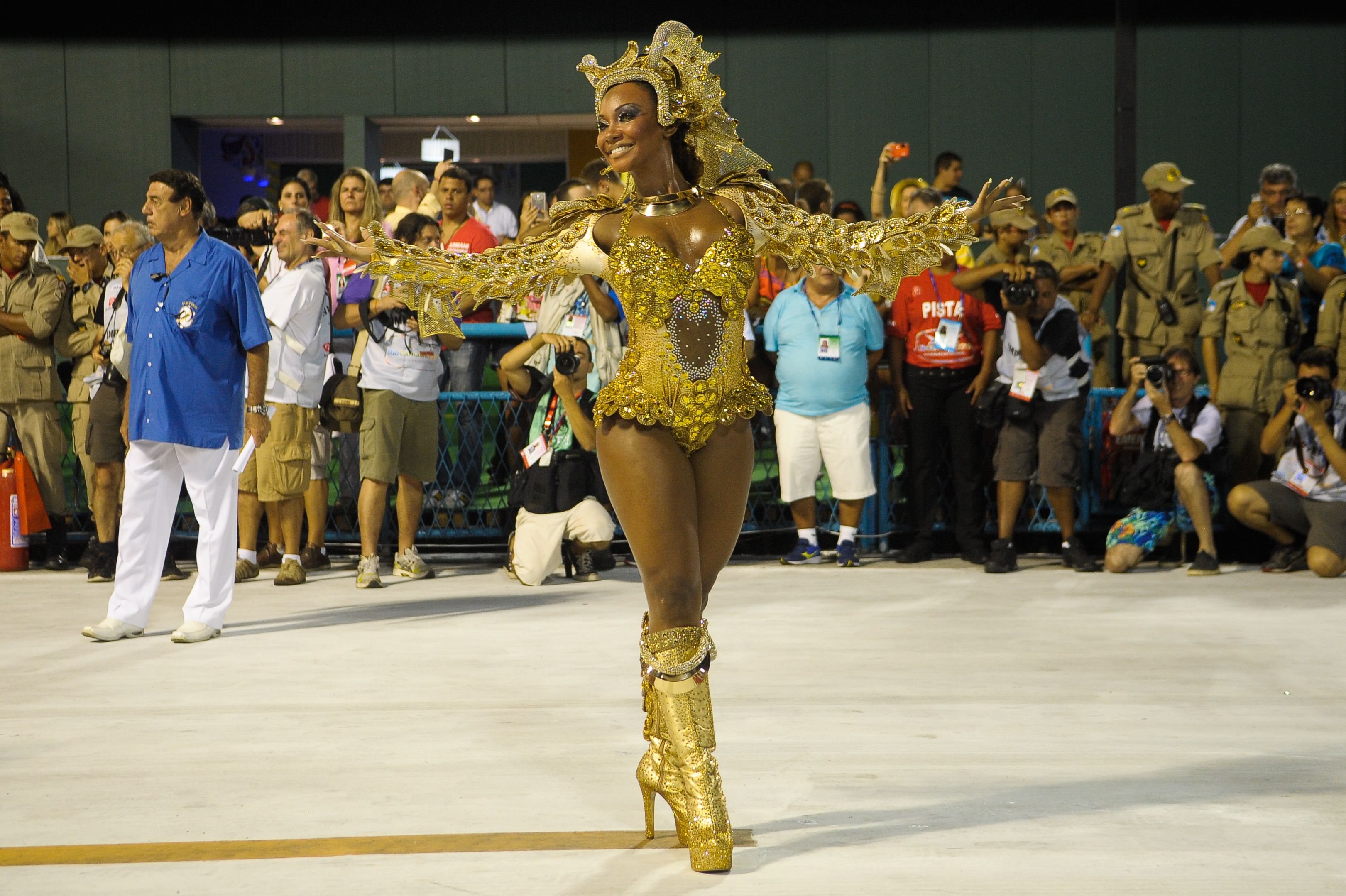 Rio de Janeiro - Escola Estácio de Sá é a primeira escola a entrar na Sapucaí,leva à avenida enredo sobre São Jorge (Tomaz Silva/Agência Brasil)